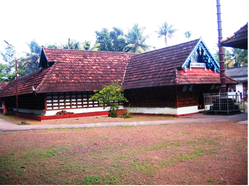 പരിപ്പ് മഹാദേവക്ഷേത്രം, പരിപ്പ്, അയ്മനം, കോട്ടയം ജില്ല